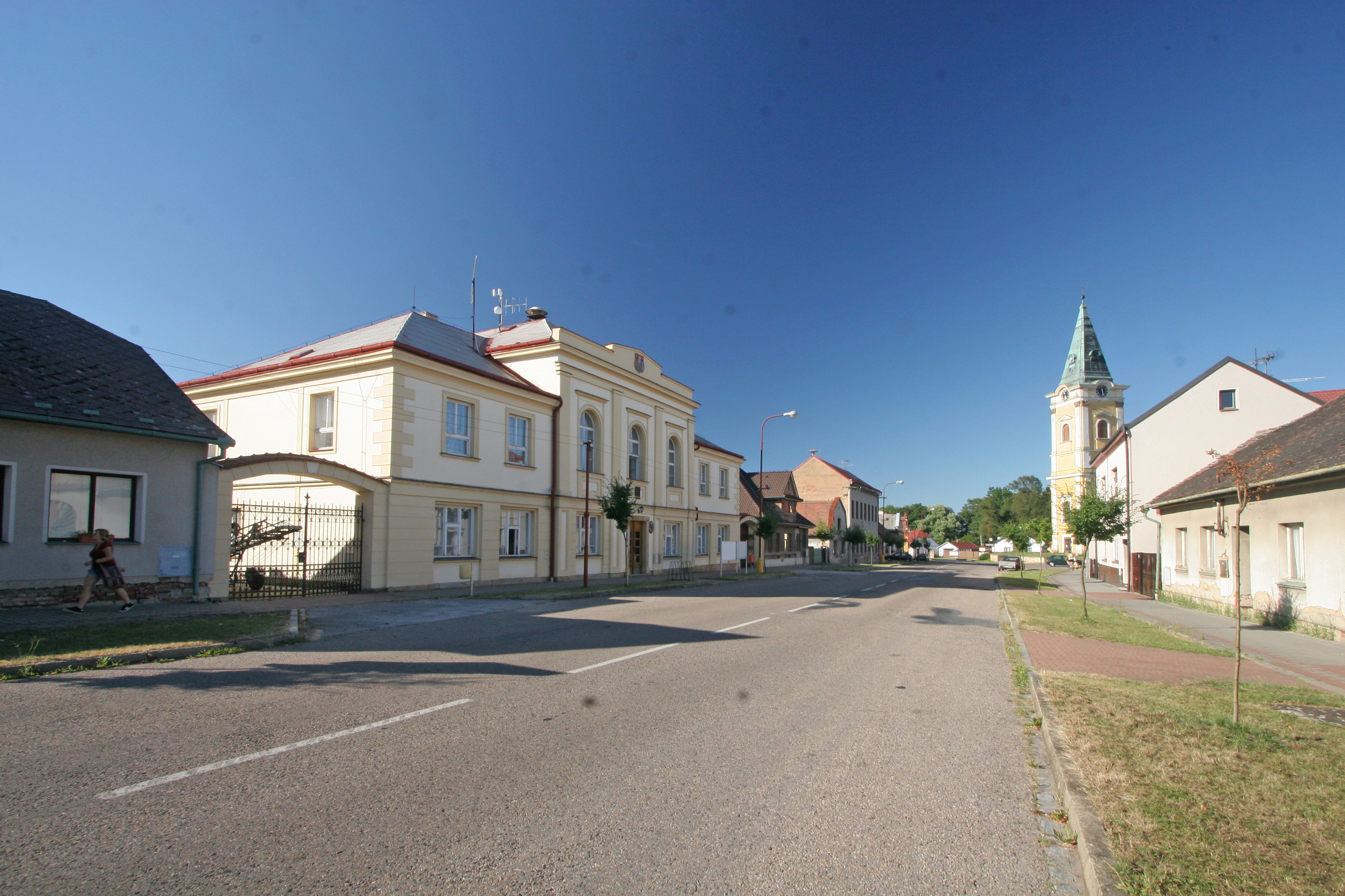 Smidary obecní úřad